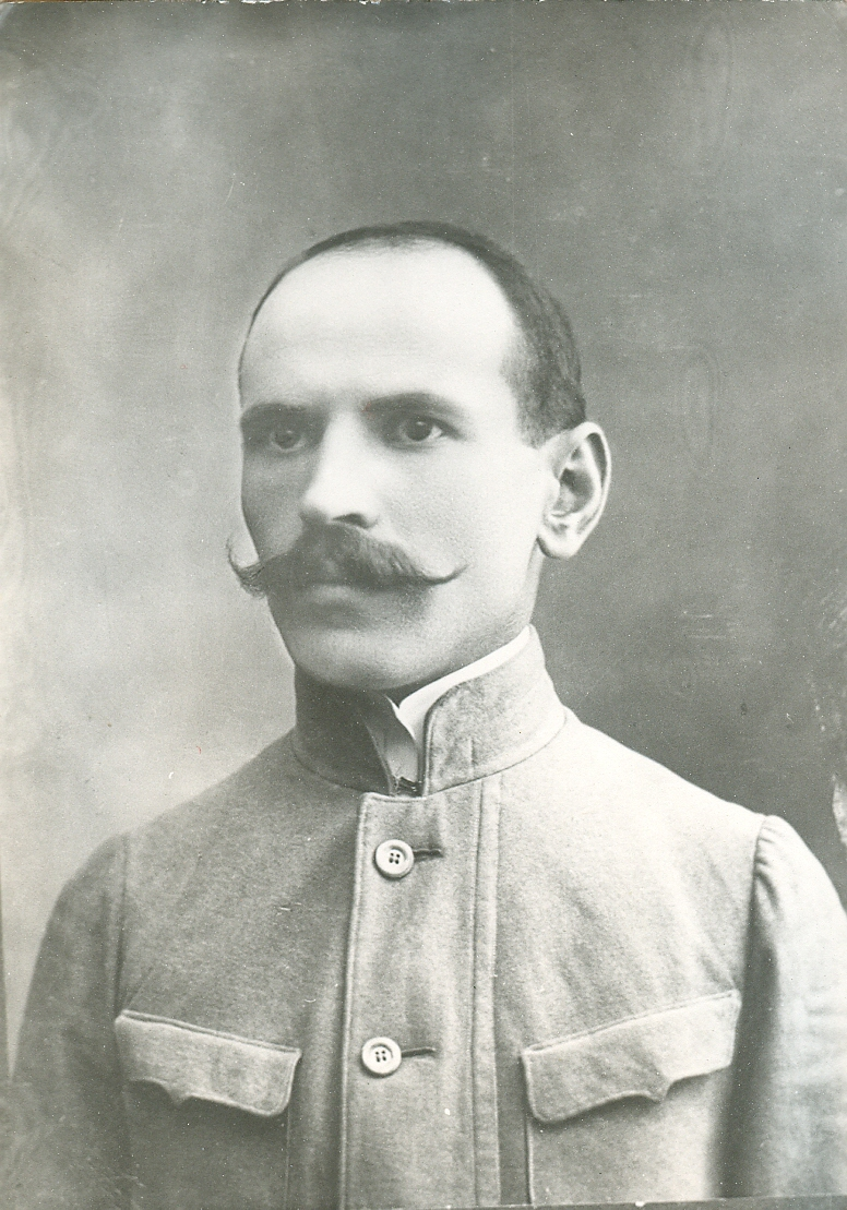 Stanisław Tatarkiewicz